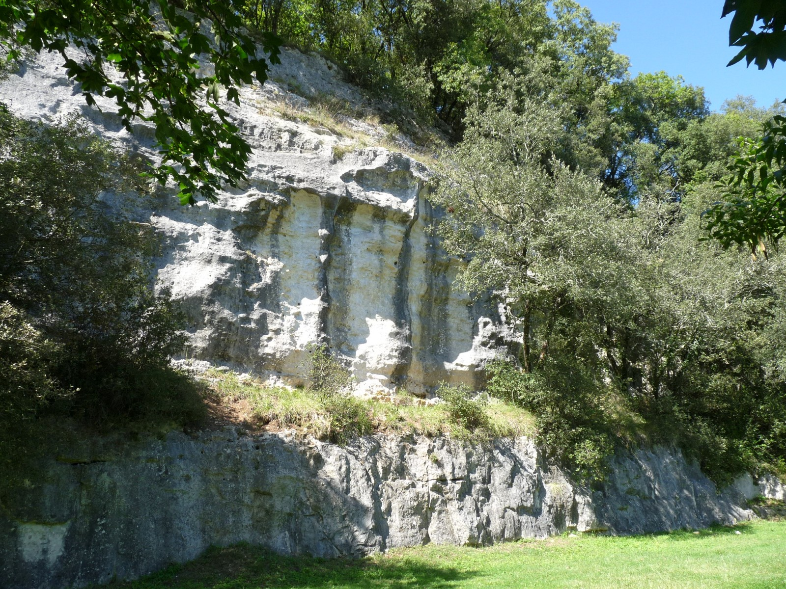 Anciennes carrières, Marignac, Charente-Maritime, France